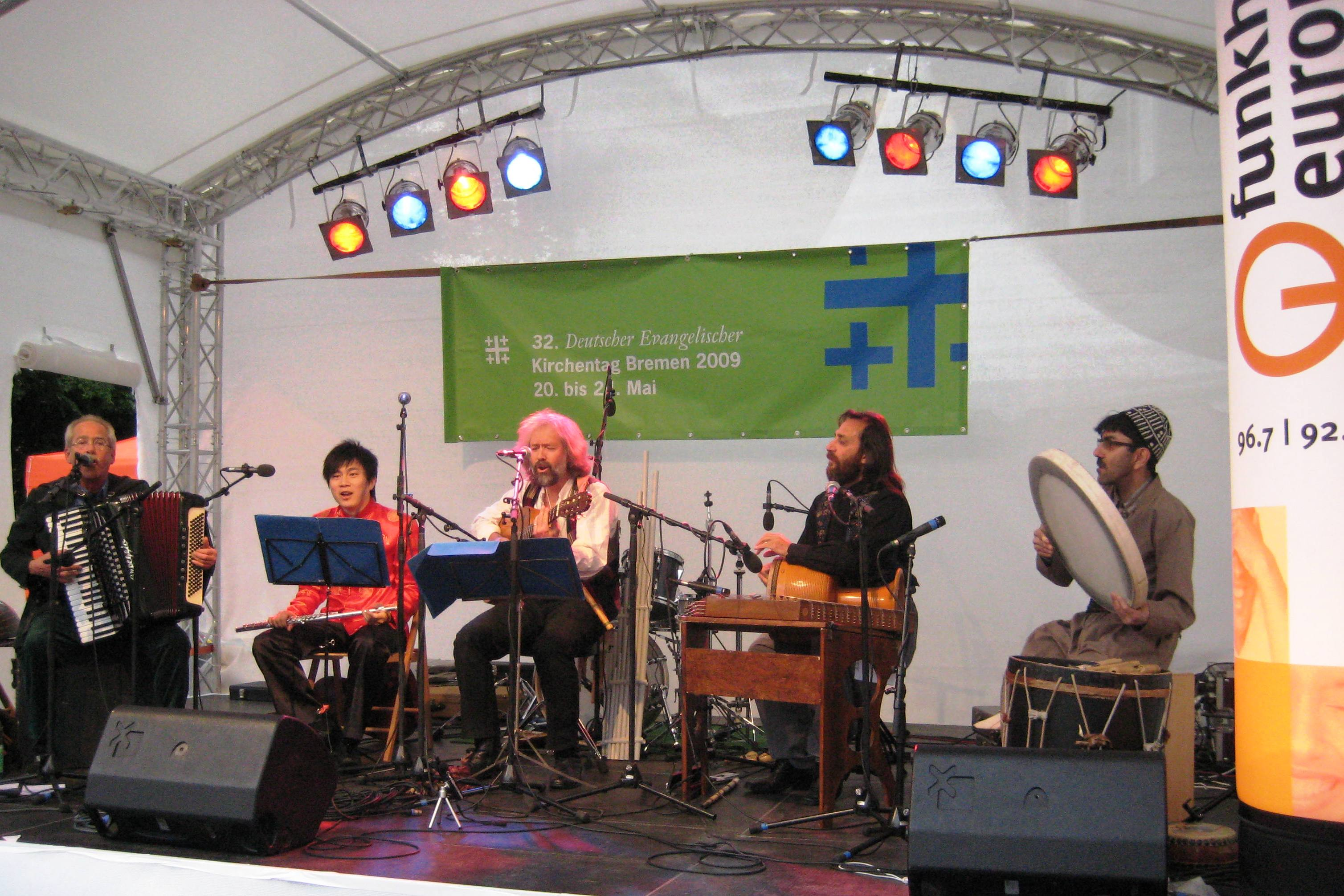 32. Deutscher Evangelischer Kirchentag in Bremen, "Abend der Begegnung", Funkhaus-Europa-Bühne: Musikprogramm "Grenzen überwinden" (Weltmusik), Bremer Stadtimmigranten Orchester (in Teilbesetzung)